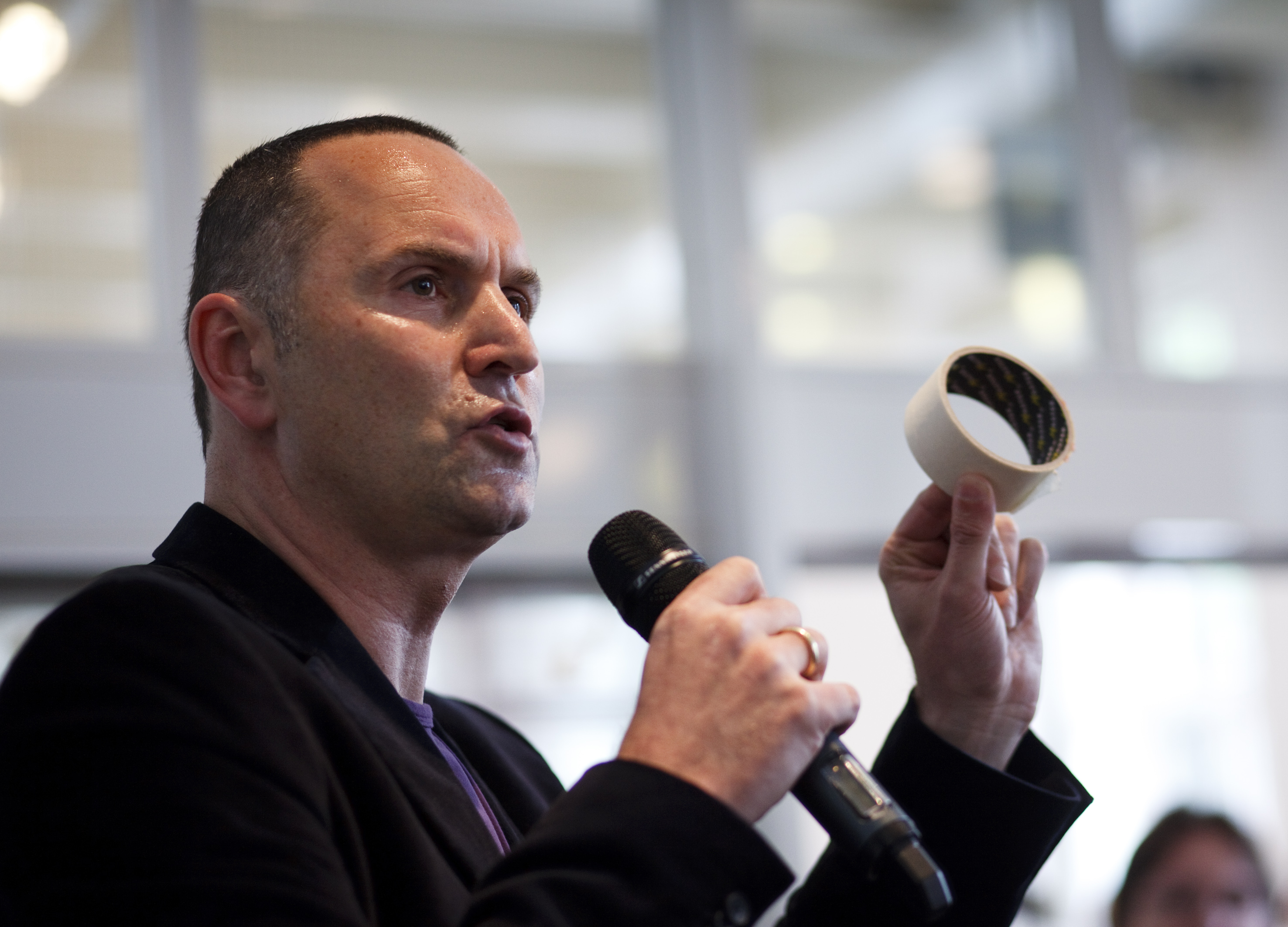 Raoul Heertje en een rol tape in 2010 Van 27 mei tot en met 29 augustus 2010 presenteert het Nationaal Historisch Museum de Nationale Automatiek in het Amsterdams Historisch Museum. Deze ‘historische’ automatiek bevat oer-Nederlandse objecten die bezoekers voor één of twee euro ‘uit de muur’ kunnen halen om mee naar huis te nemen. Fotografie door Fred Ernst (